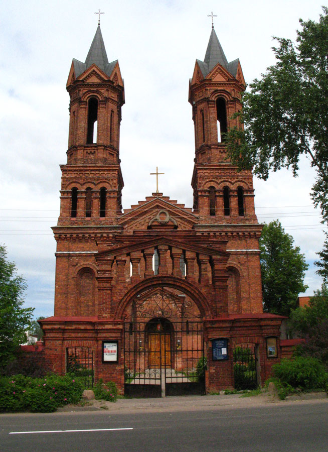 Беларуская (тарашкевіца): Віцебск, касьцёл Сьвятой Барбары